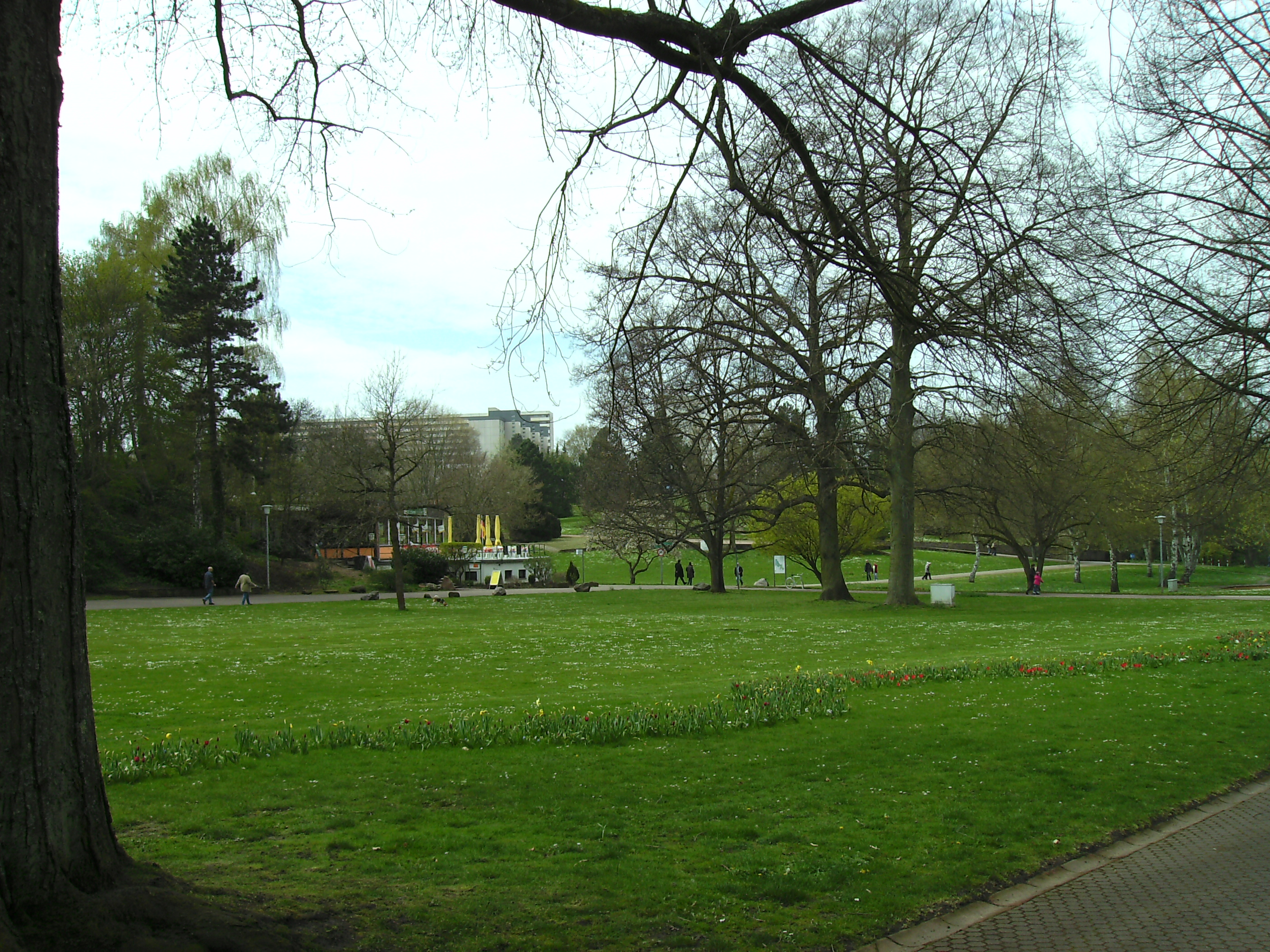 Saarbrücken: Deutsch-Französischer Garten, Parkausschnitt